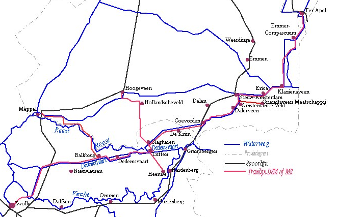 Zelfgemaakte kaart van de stoomtramlijnen van de DSM en MB, verbeterde versie van Stoomtramlijnen DSM.png